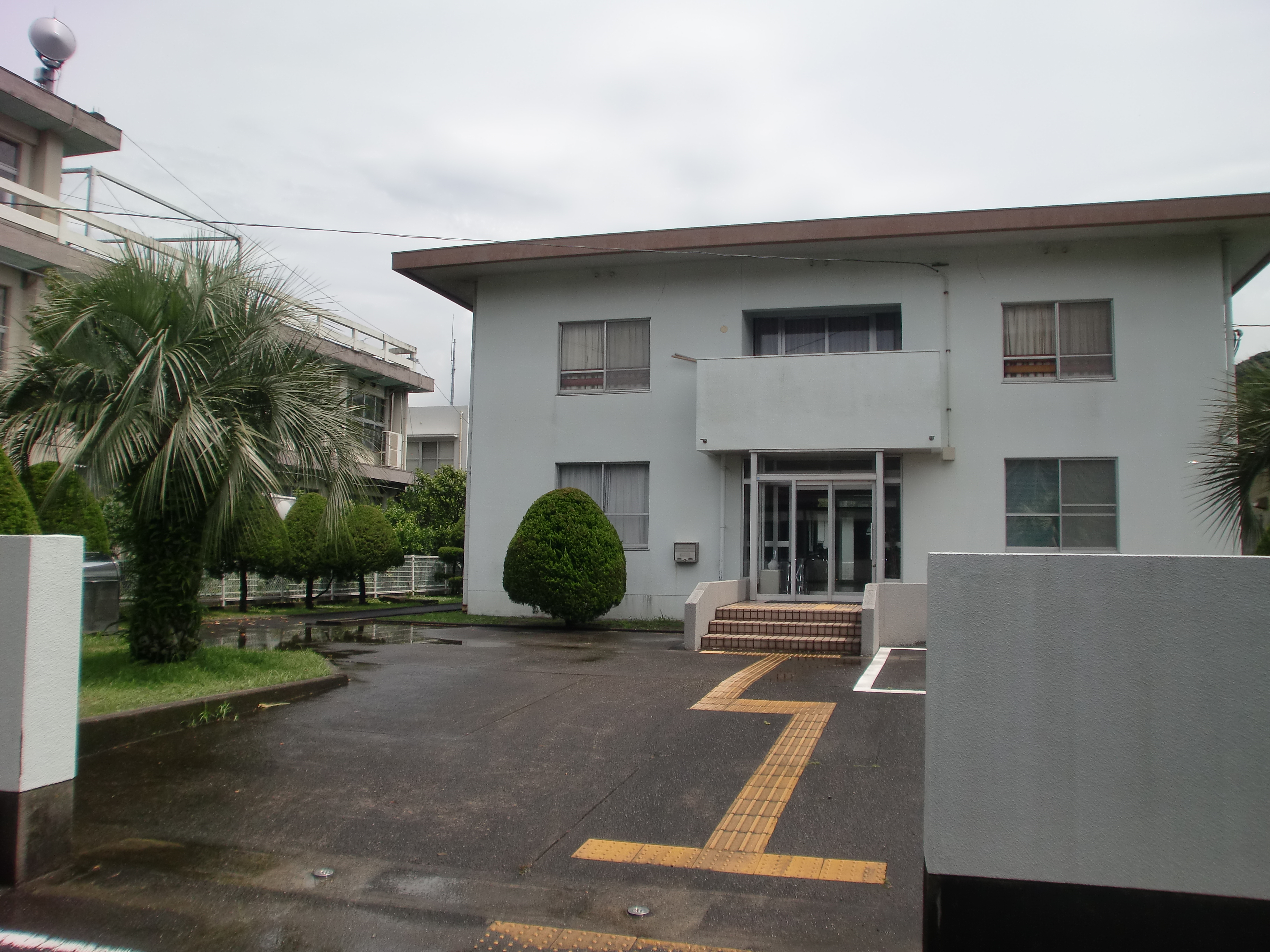 甑島簡易裁判所の外観。